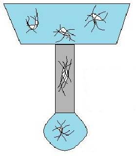 Polymer Die Swell Illustration